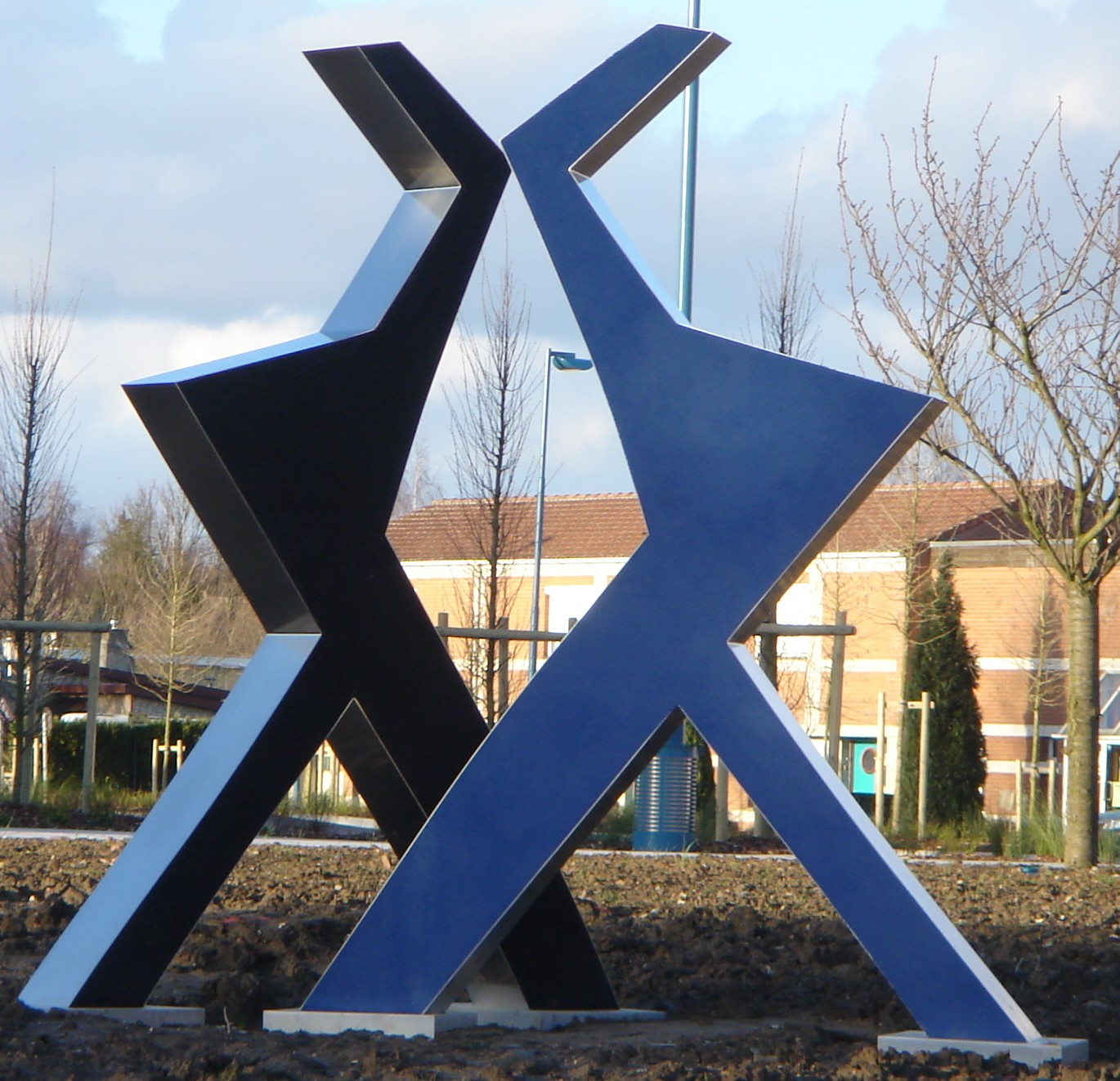 Roost-Warendin Sulpture de Hotel de ville